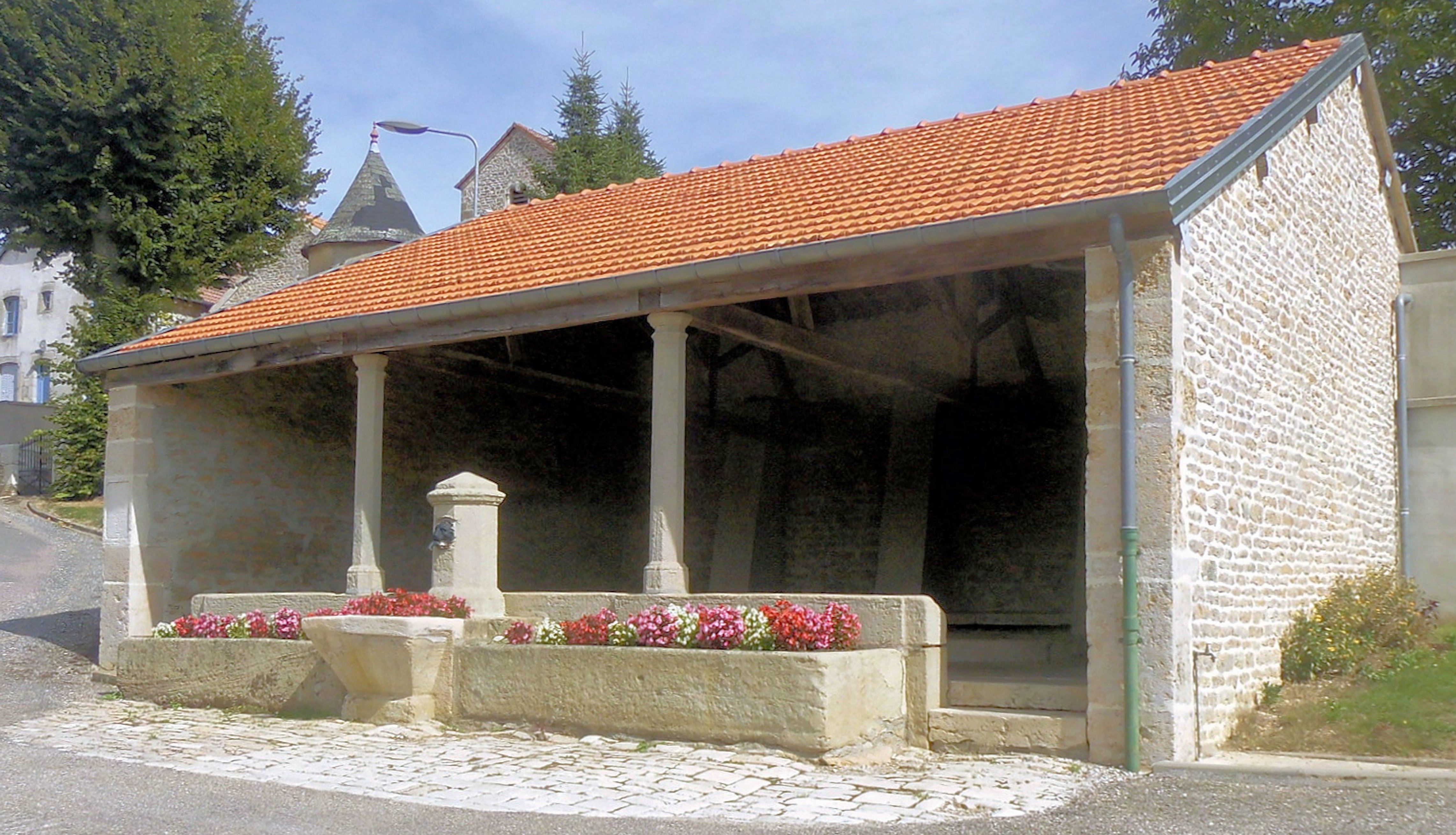 Lavoir d'Hâcourt